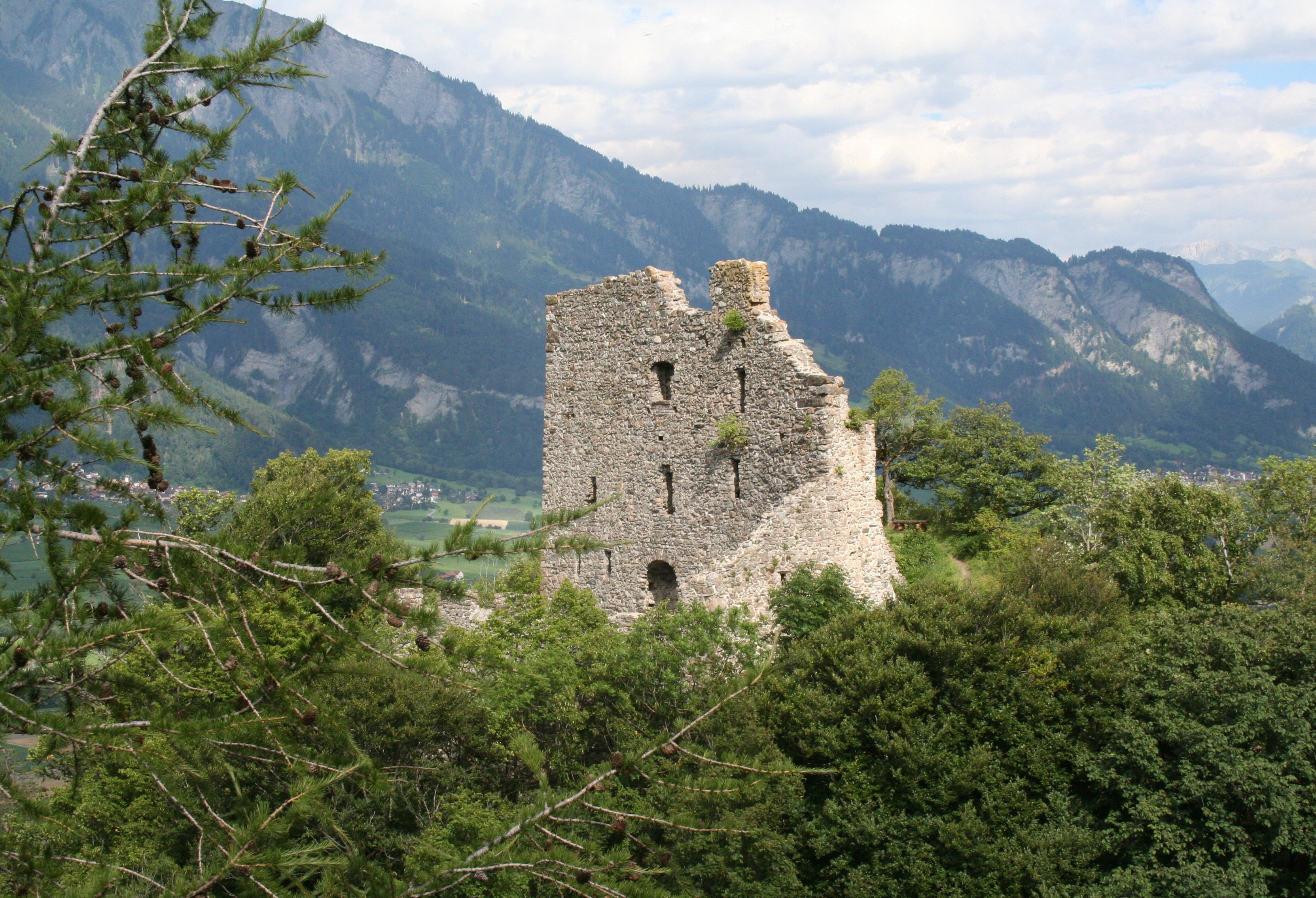 Burg Wartenstein (Pfäfers) Ansicht